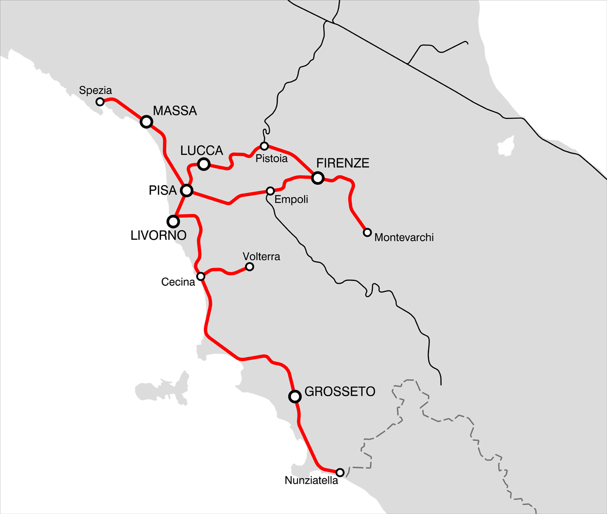 La rete delle Strade Ferrate Livornesi al momento dello scioglimento (1865)